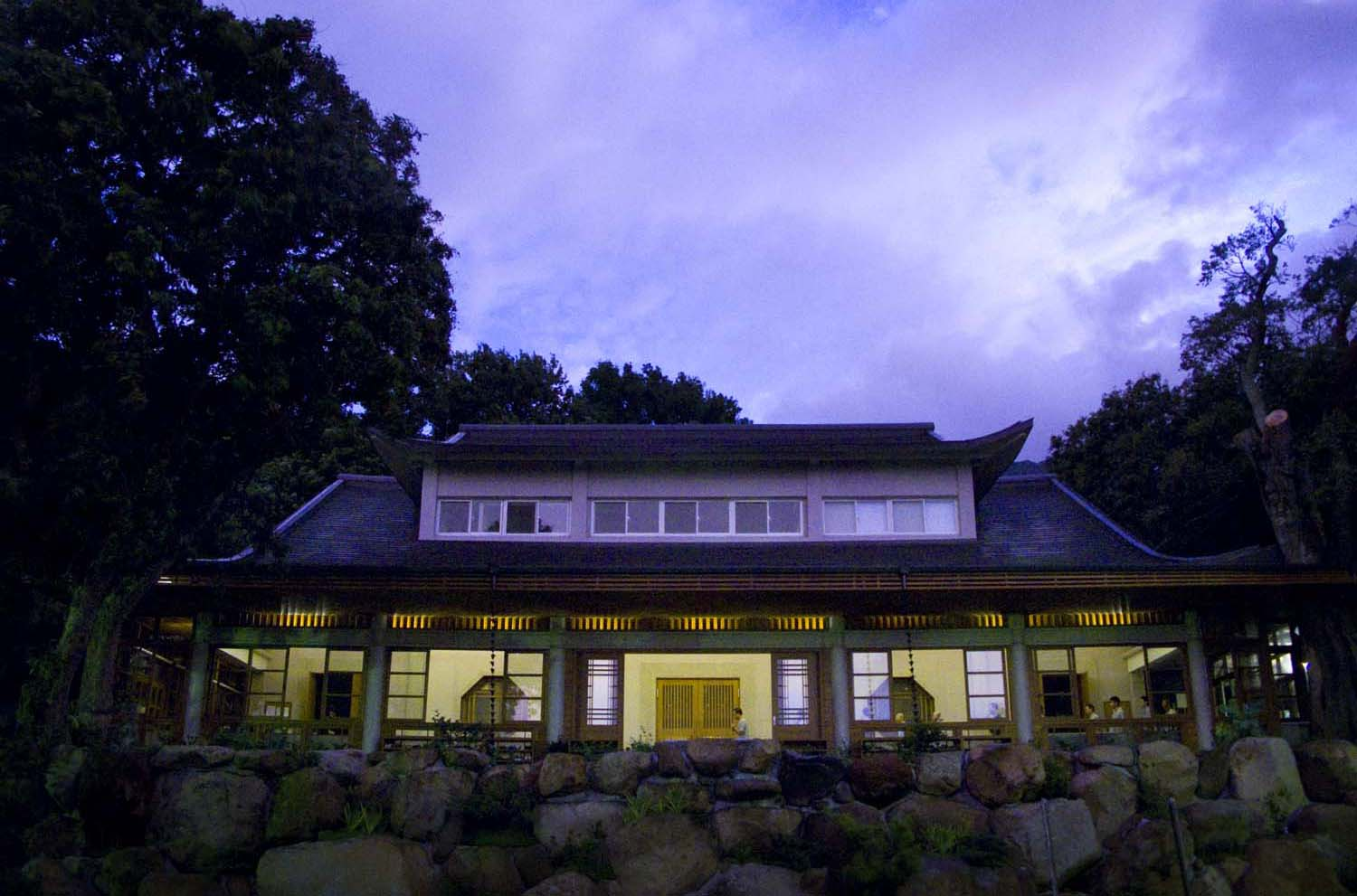 祖師禪林的剪影一景